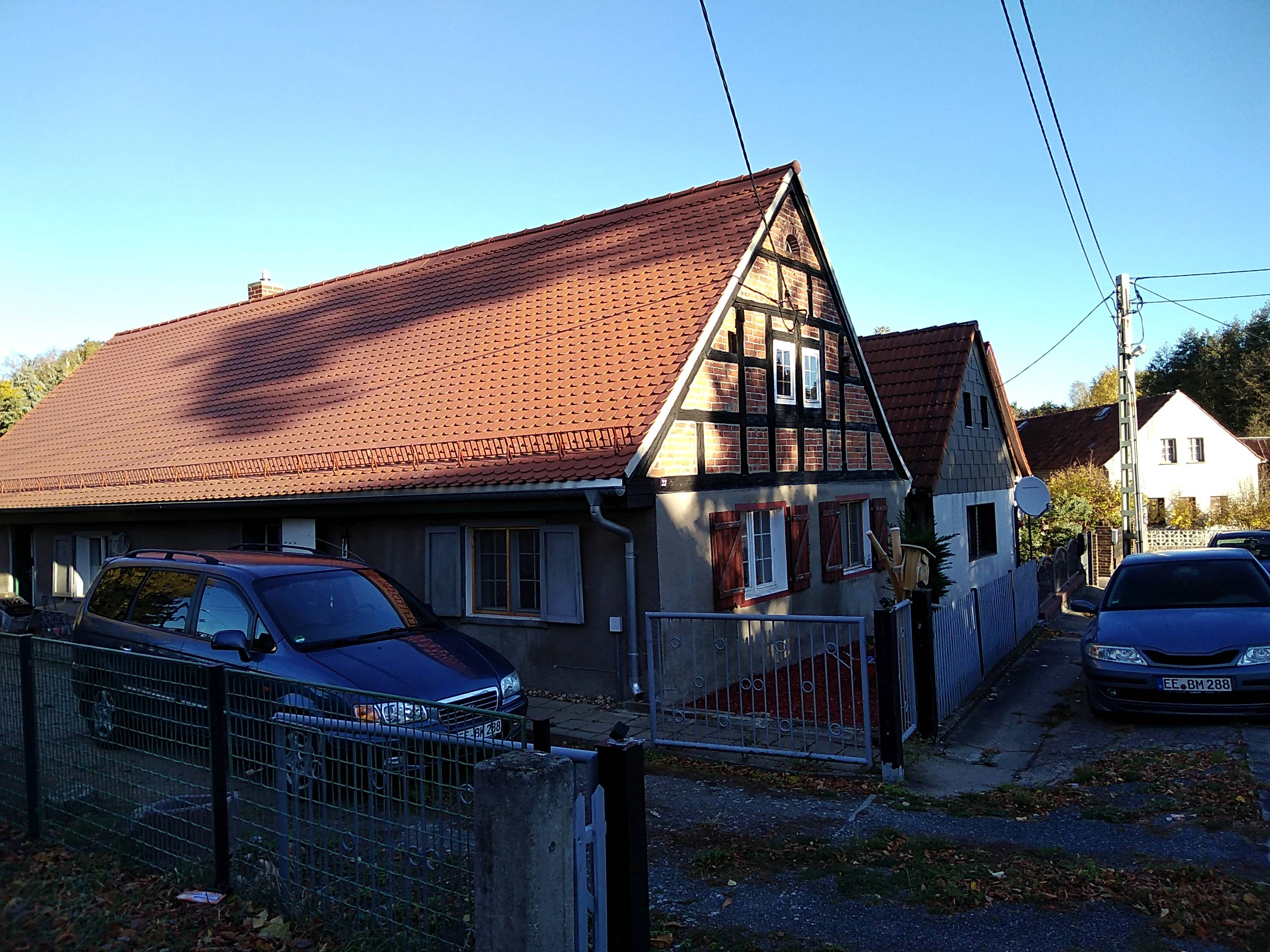 Die Dorfstraße im Elsterwerdaer Ortsteil Kraupa.